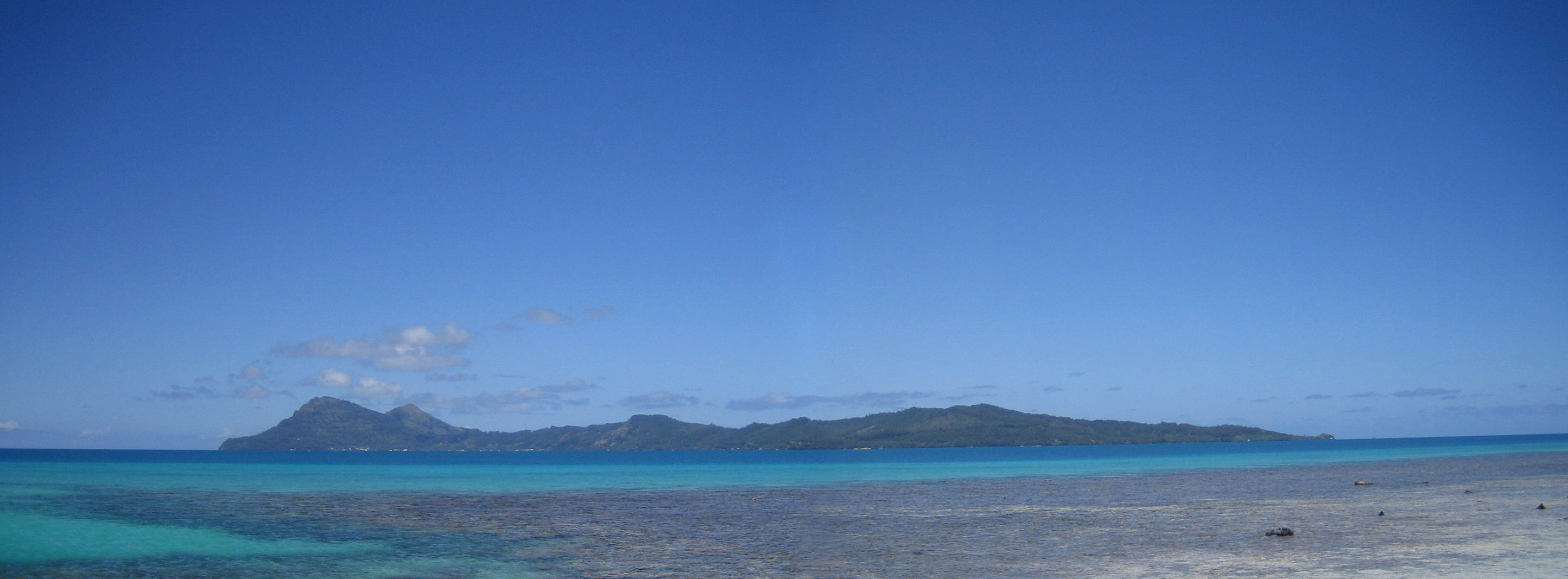 Mangareva (Gambierinseln) vom Motu Totegegie aus gesehen